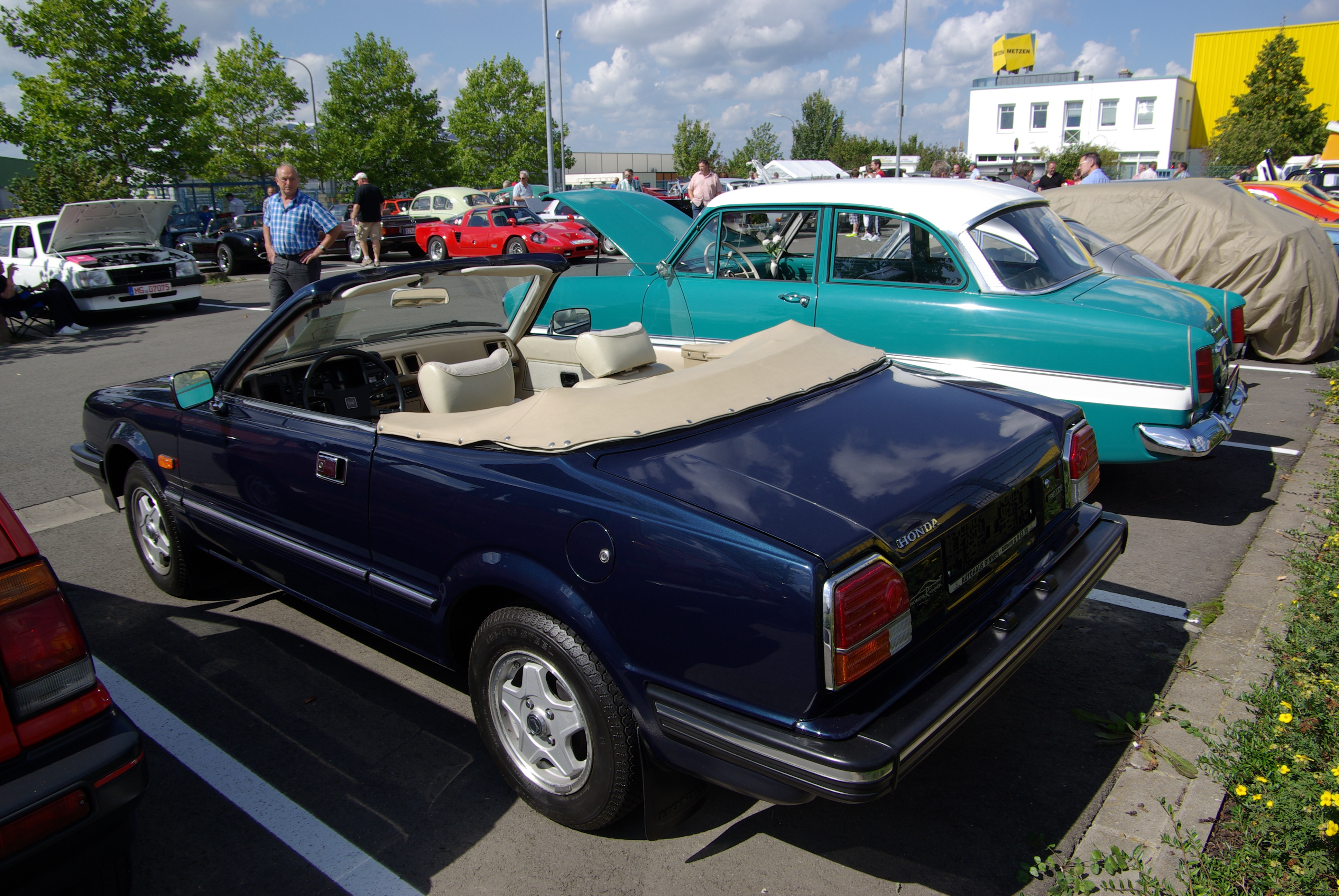 Honda Prelude, Baujahr 1981, 1600 cm³, 80 PS